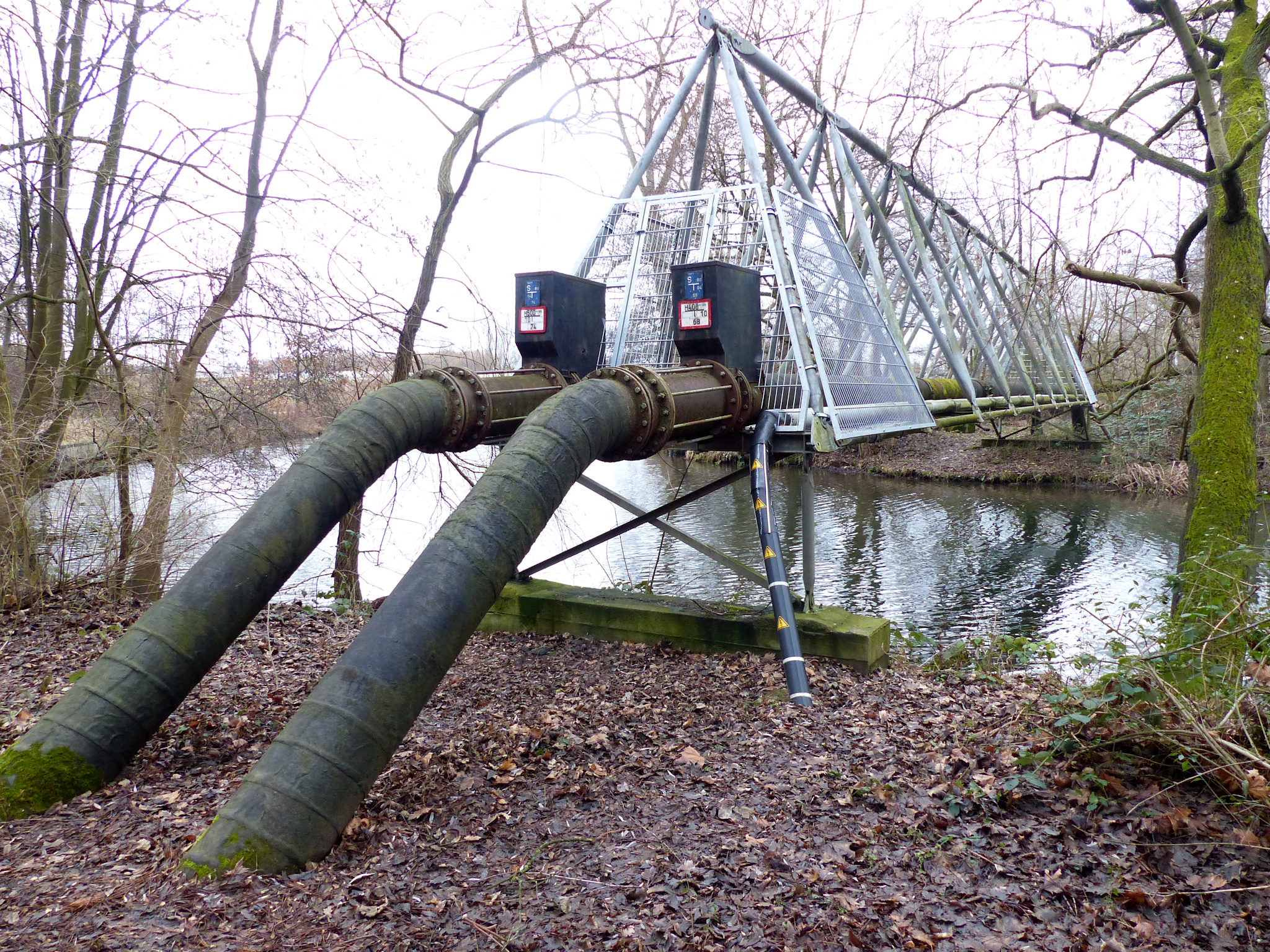 Rohrbrücke über die Oker im Richmondpark nahe der Autobahn A39, Blick vom Ostufer.